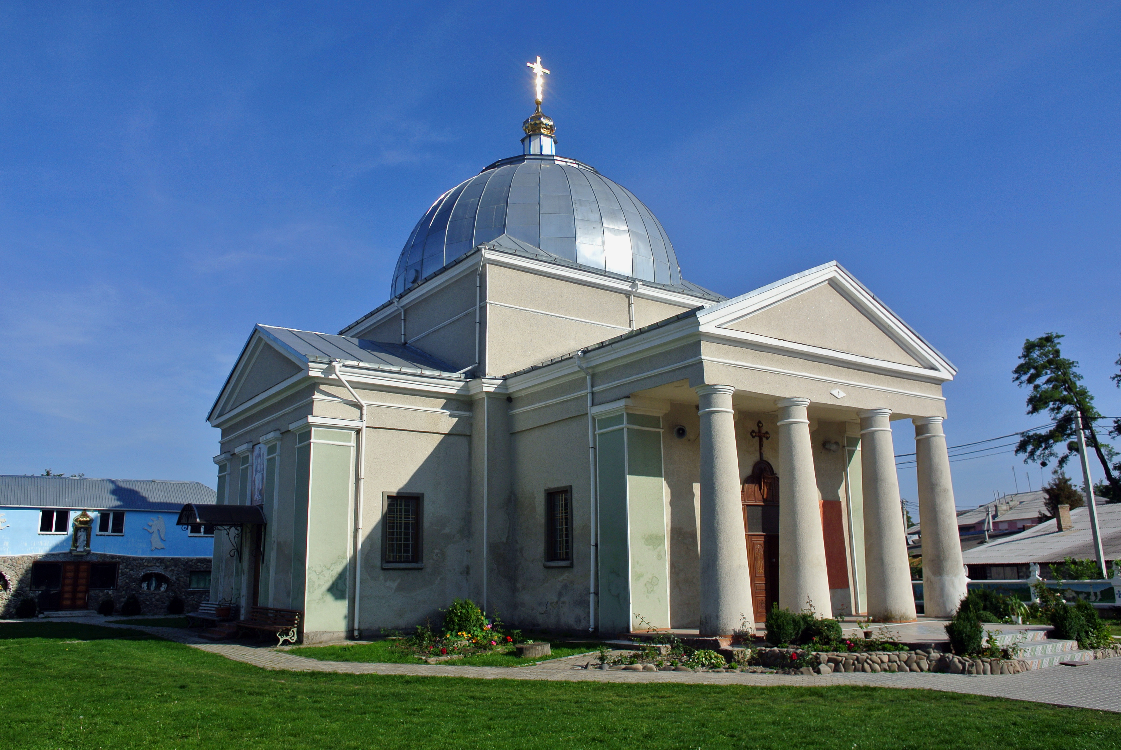 Покровська церква (мур.), Млинів, вул.Кірова